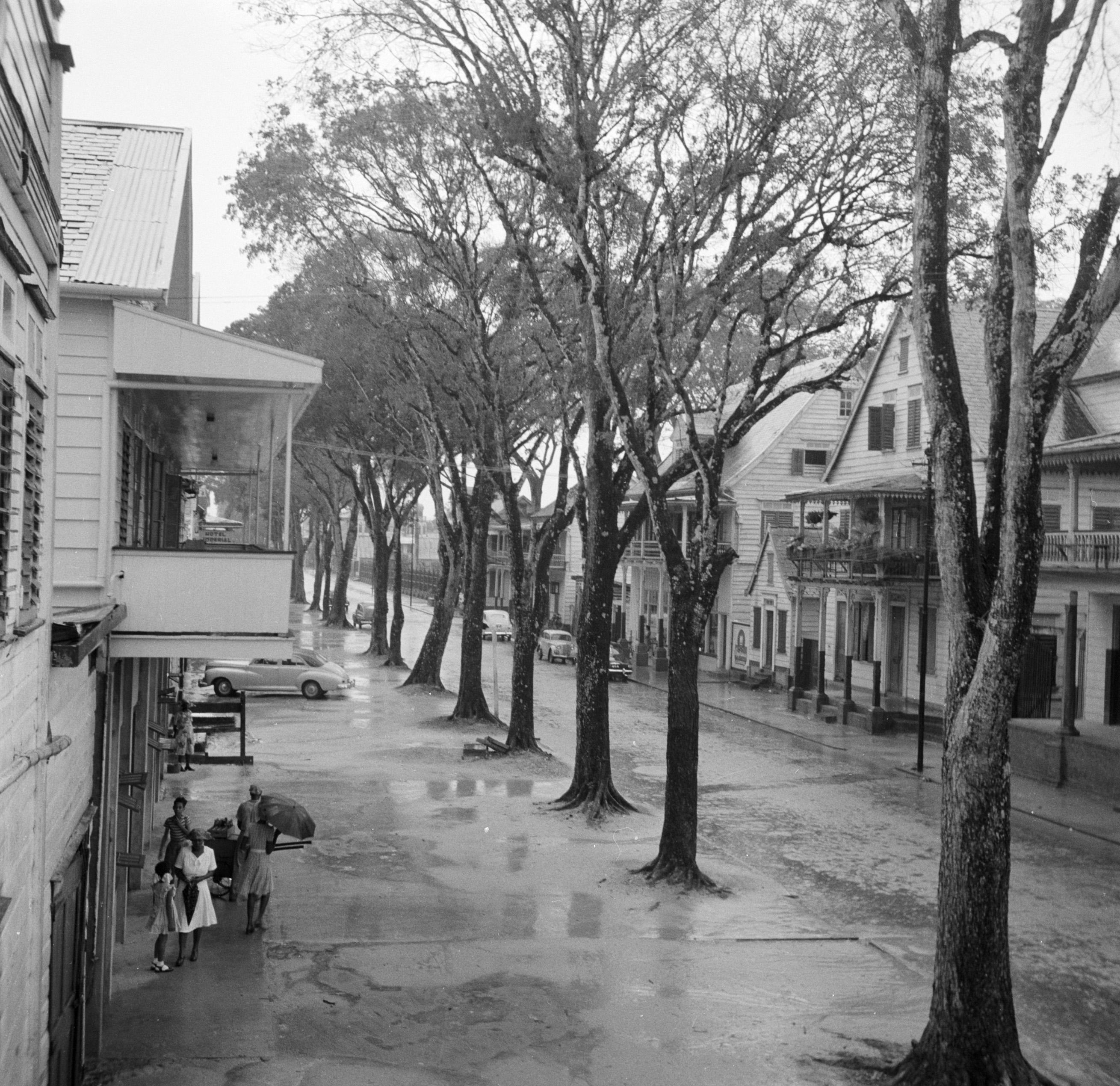 Collectie / Archief : Fotocollectie Van de Poll Reportage / Serie : Reis naar Suriname en de Nederlandse Antillen Beschrijving : De Keizerstraat in Paramaribo Datum : 1947 Locatie : Paramaribo, Suriname Trefwoorden : regen, straatbeelden Fotograaf : Poll, Willem van de, [onbekend] Auteursrechthebbende : Nationaal Archief Materiaalsoort : Negatief (zwart/wit) Nummer archiefinventaris : bekijk toegang 2.24.14.02 Bestanddeelnummer : 252-6161